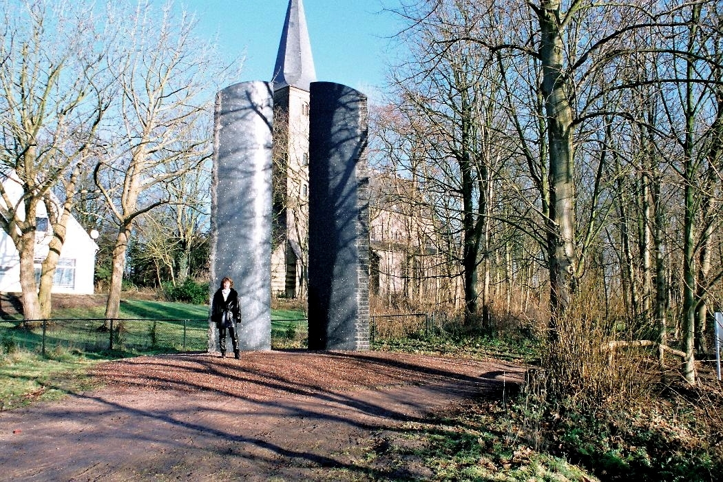 Skulptur „Steintor“ auf dem Eltenberg in Elten bei Emmerich am Rhein. Bildhauer: Christoph Wilmsen-Wiegmann. Im Hintergrund: St. Vitus